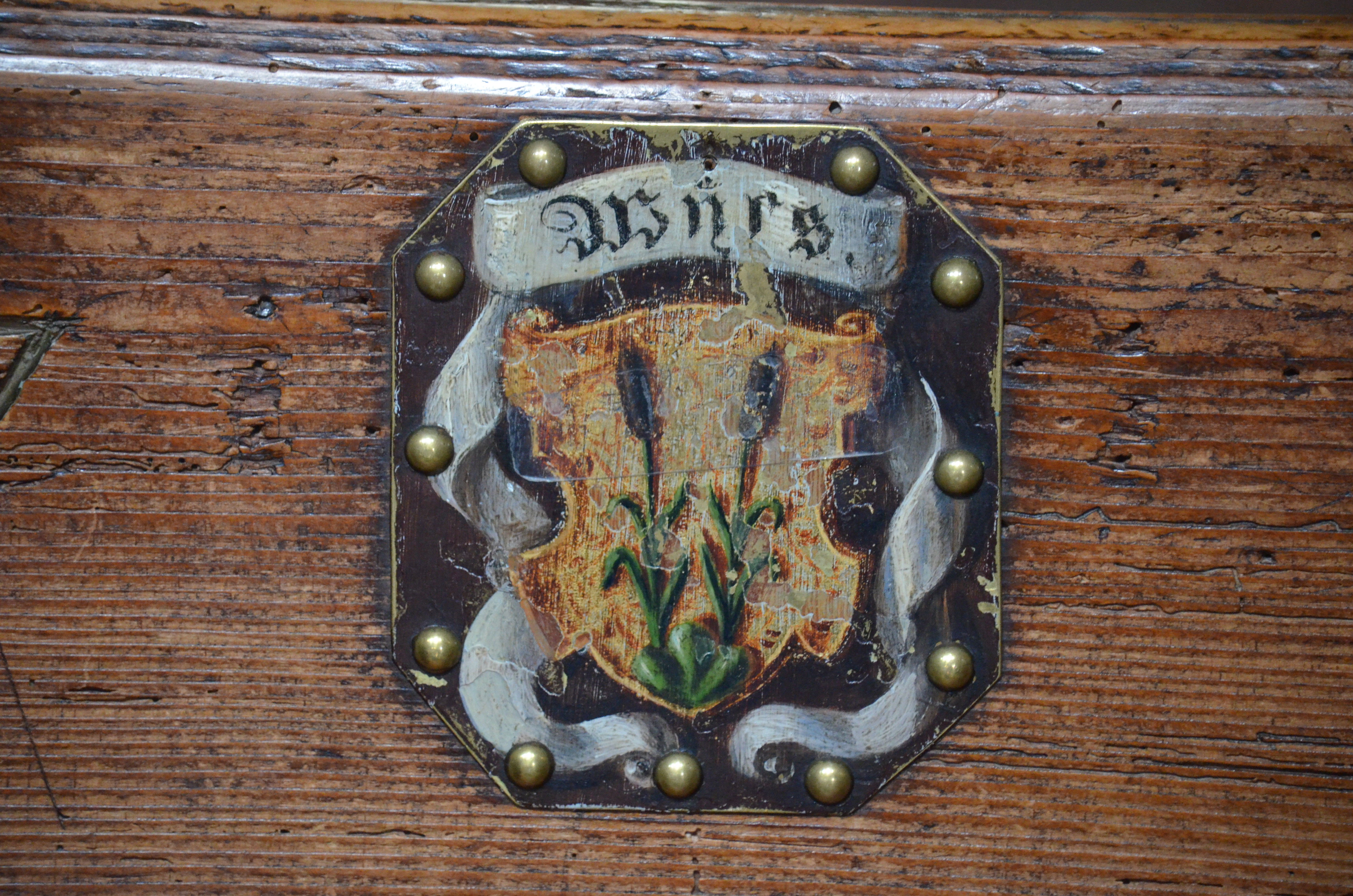 Bern, Münster, Kirchenortschild Wyss (Kolben)